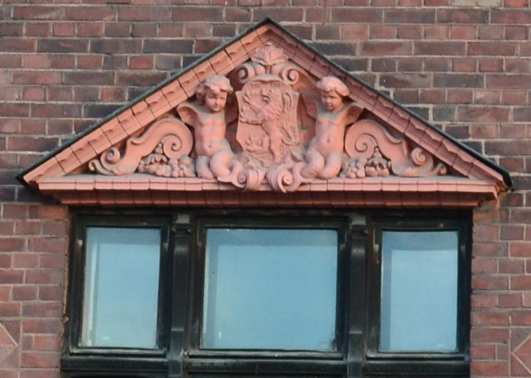 Здание частного банка (Санкт-Петербург и Лен.область, Выборг, ленина пр., 2)